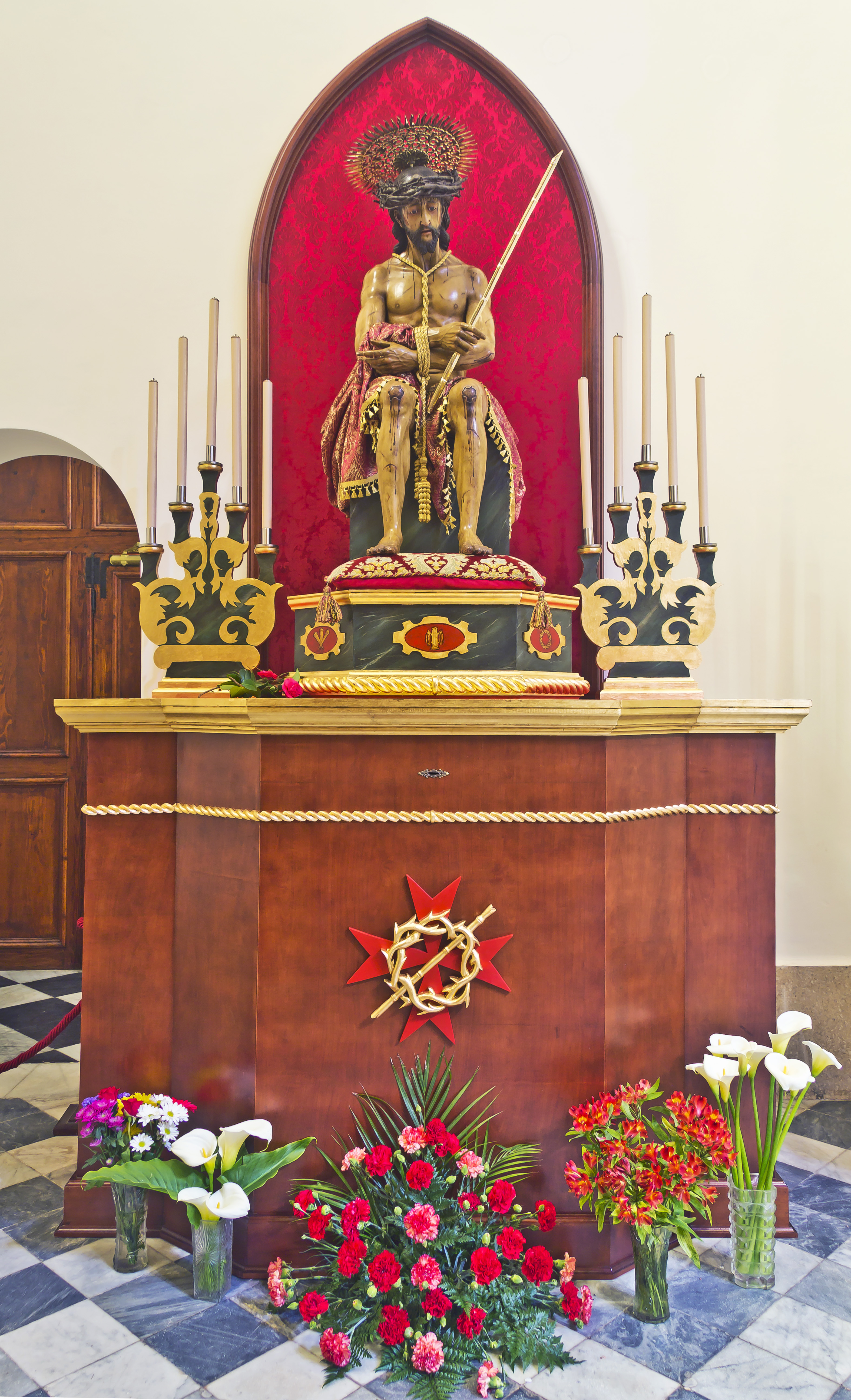 Neuer Standplatz des Señor de la caña in der Kathedrale La Laguna